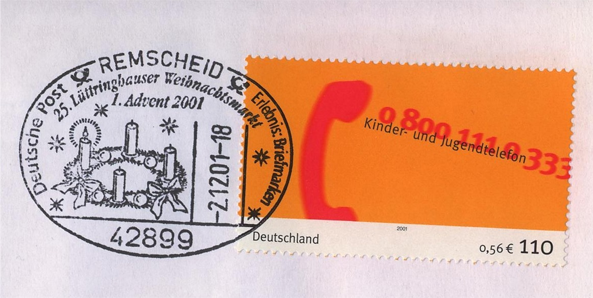 Sonderstempel aus Anlass des 25. Lüttringhauser Weihnachtsmarktes 2001 Selbst fotografiert Aufgenommen mit Olympus C3040 Aufnahmedatum 07/2007